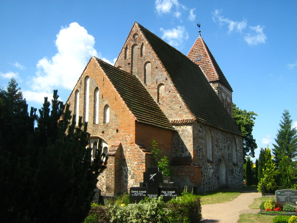 Die Kirche in Thulendorf, Landkreis Bad-Doberan, Mecklenburg-Vorpommern.